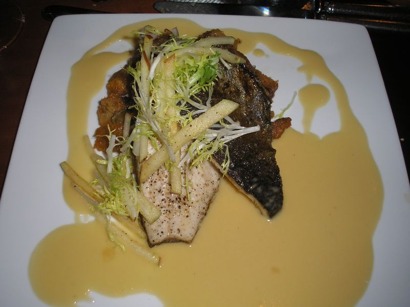 Truite à la vauclusienne